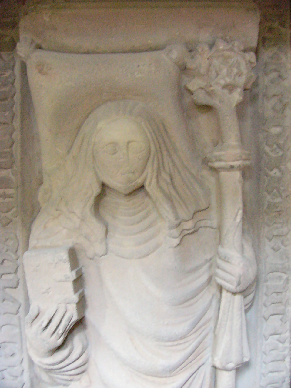 Darstellung der Äbtissin Anna von Nürnberg auf ihrem Epitaph in der Klosterkirche von Himmelkron